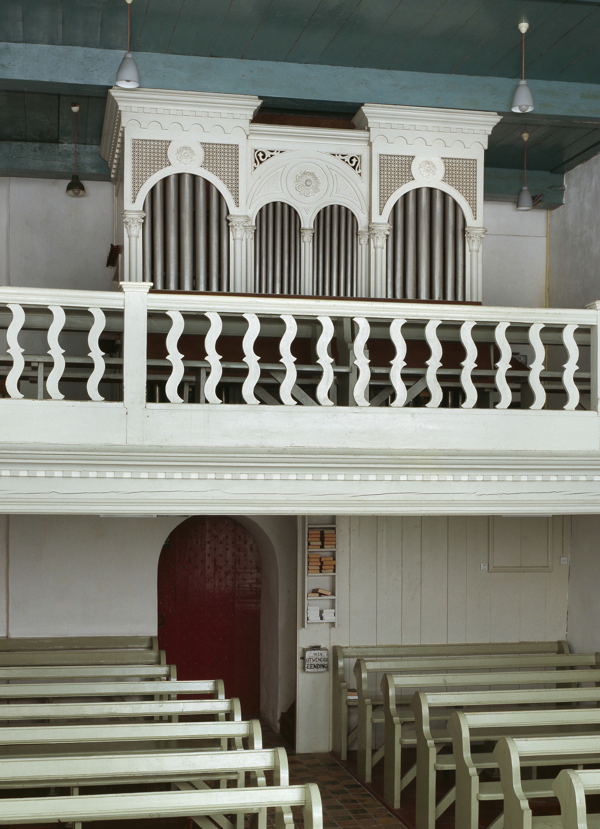 Nederlands Hervormde Kerk: Interieur, aanzicht orgel, orgelnummer 1012 (opmerking: Gefotografeerd voor Het Historische Orgel in Nederland 1894-1901, bladzijde 36)